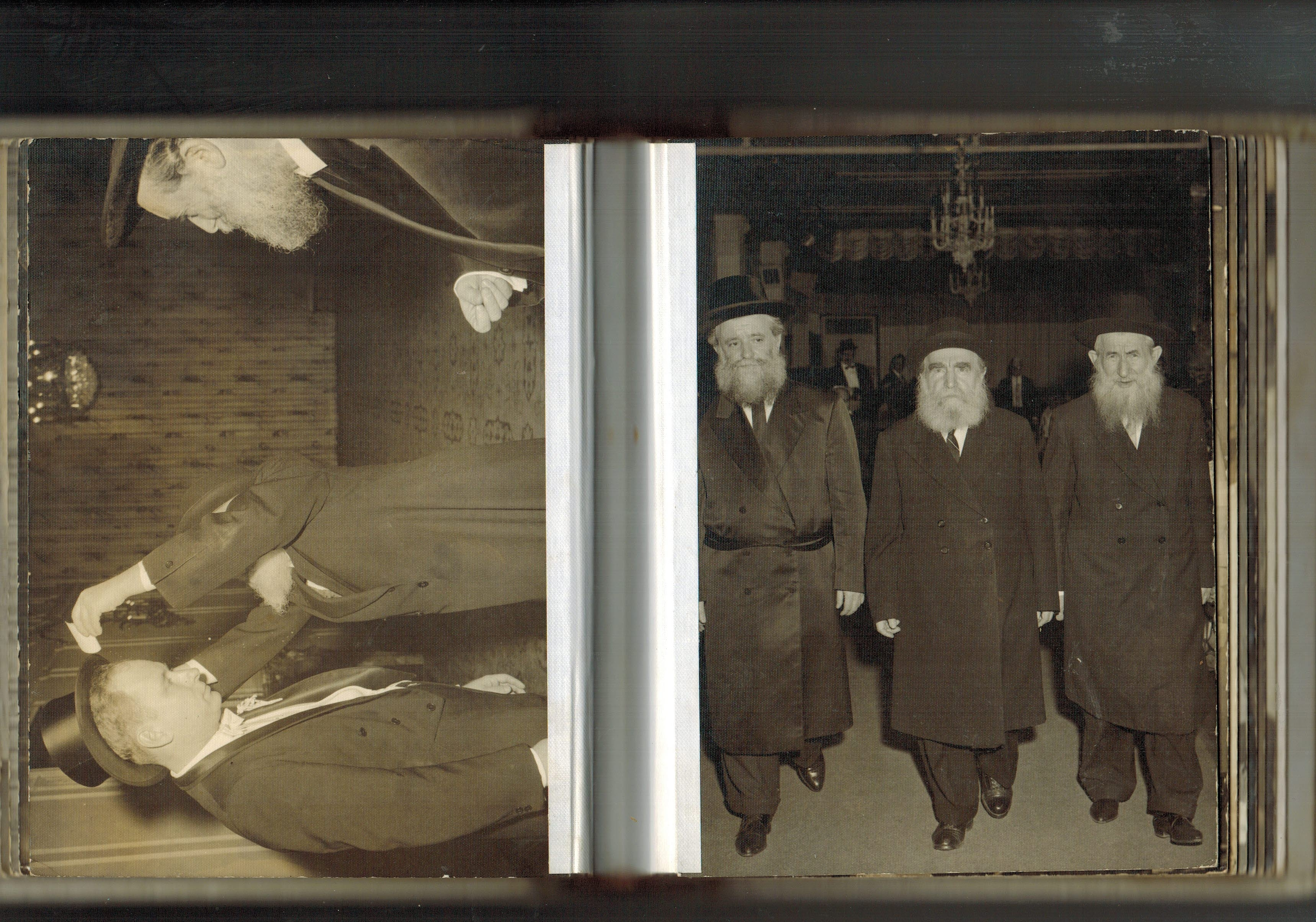 Moshe Feinstein בחתונה בתו של רבי יונה שטנצל בארה"ב